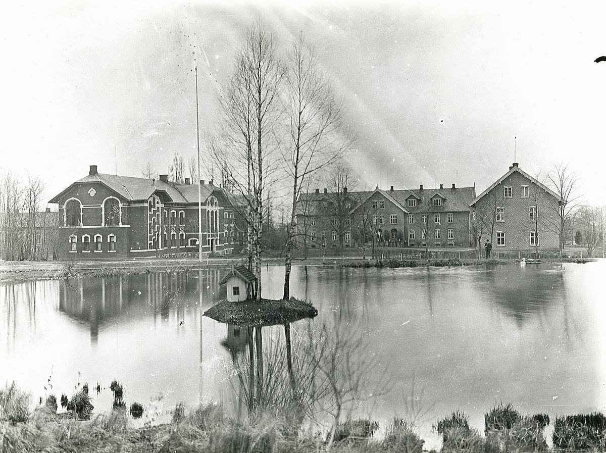 Landbrukshøgskolen på Ås, skolebygninger, dam, holme